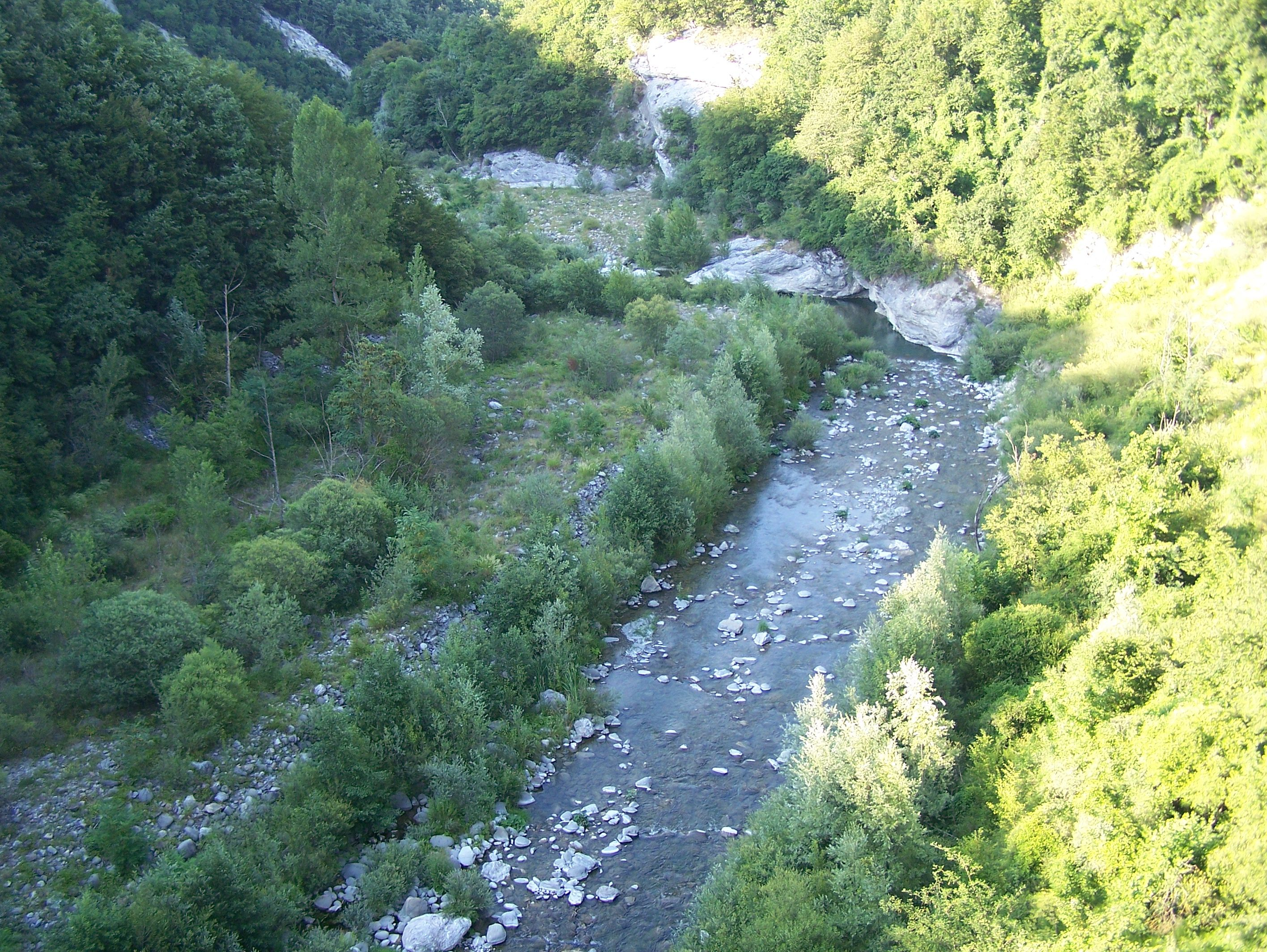 Panorama del fiume Enza tra i comuni di Palanzano e Ramiseto in periodo di magra. Eseguito con macchina fotografica digitale non professionale dall'Utente:Kronos.